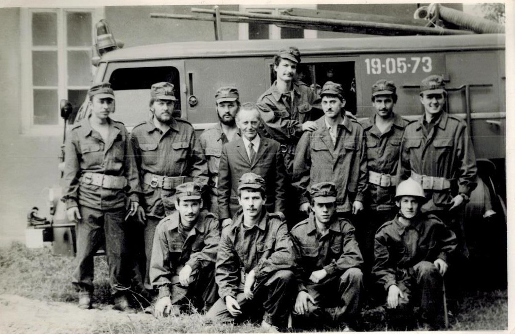 Sekcja OSP Pisarowce 1984r.